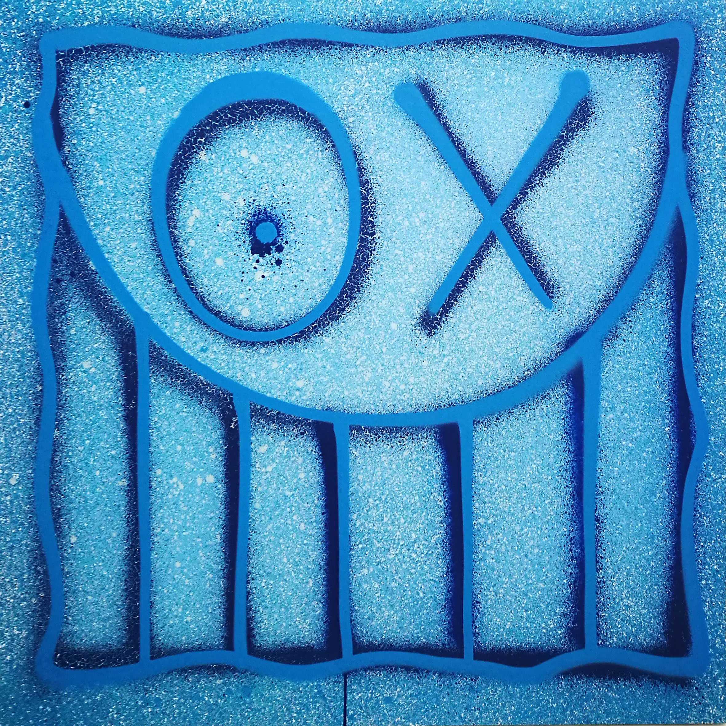 100cm X 100cm